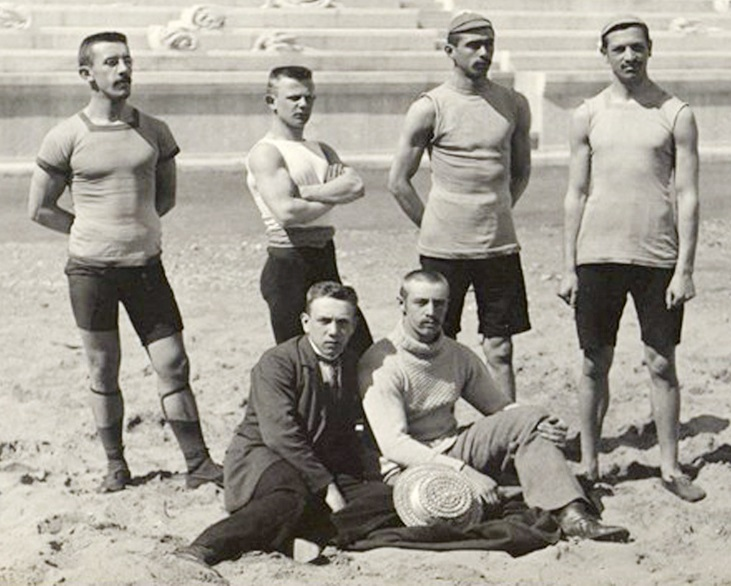 Az első olimpián részt vett magyar csapat hat tagja. Nincs a képen a csapat hetedik tagja, Tapavicza Momcsilló